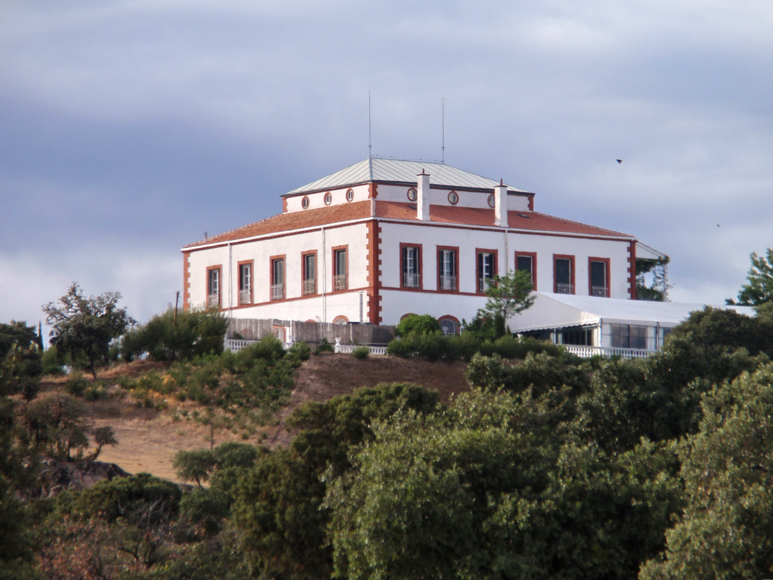 Torrelodones. Finca El Pendolero, situada en Los Peñascales.